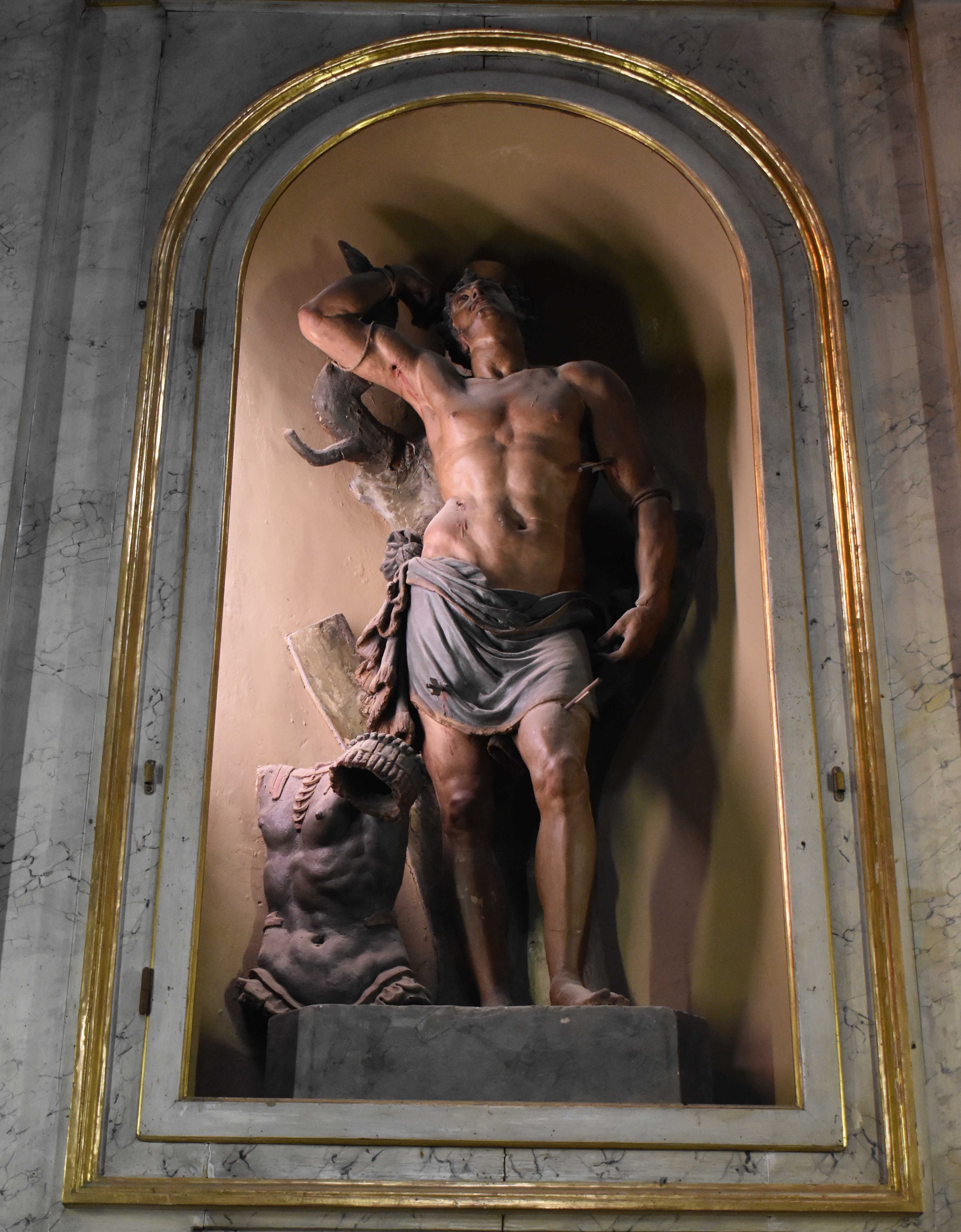 Orazio Grillenzoni, San Sebastiano, (1581 ca.), terracotta policroma, chiesa san Carlo (Ferrara) (già in Sant'Anna dell'Ospedale)